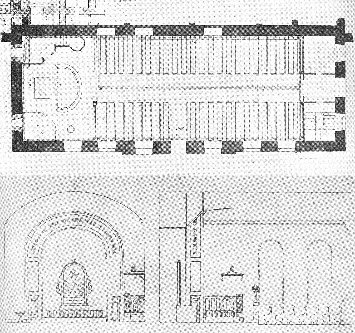 Kastelskirken (Citadel Church), Copenhagen, Denmark. Plans for remodelling 1857. Presumably by N. S. Nebelong.